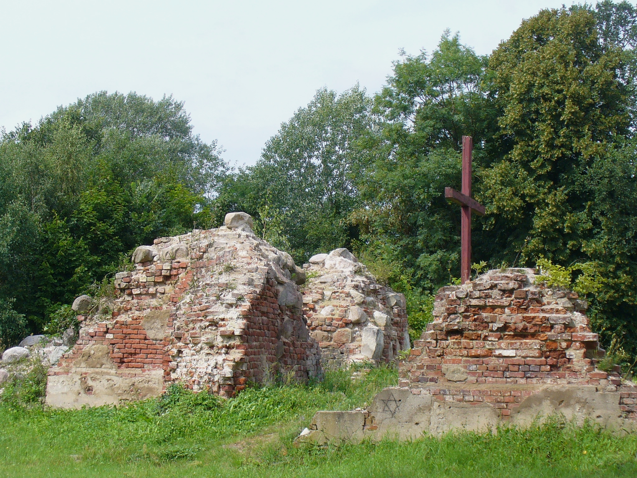 Festung Küstrin (Altstadt) - Kirche